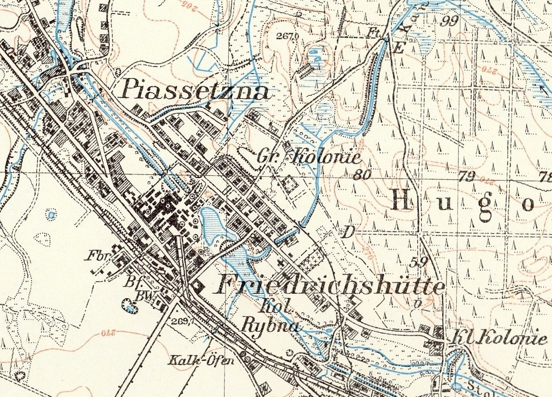 Fragment niemieckiej mapy Górnego Śląska z 1914 roku z miejscowościami Piaseczna (niem. Piassetzna), Strzybnica (niem. Friedrichshütte) oraz Rybną-Kolonią (niem. Kol. Rybna)koło Tarnowskich Gór